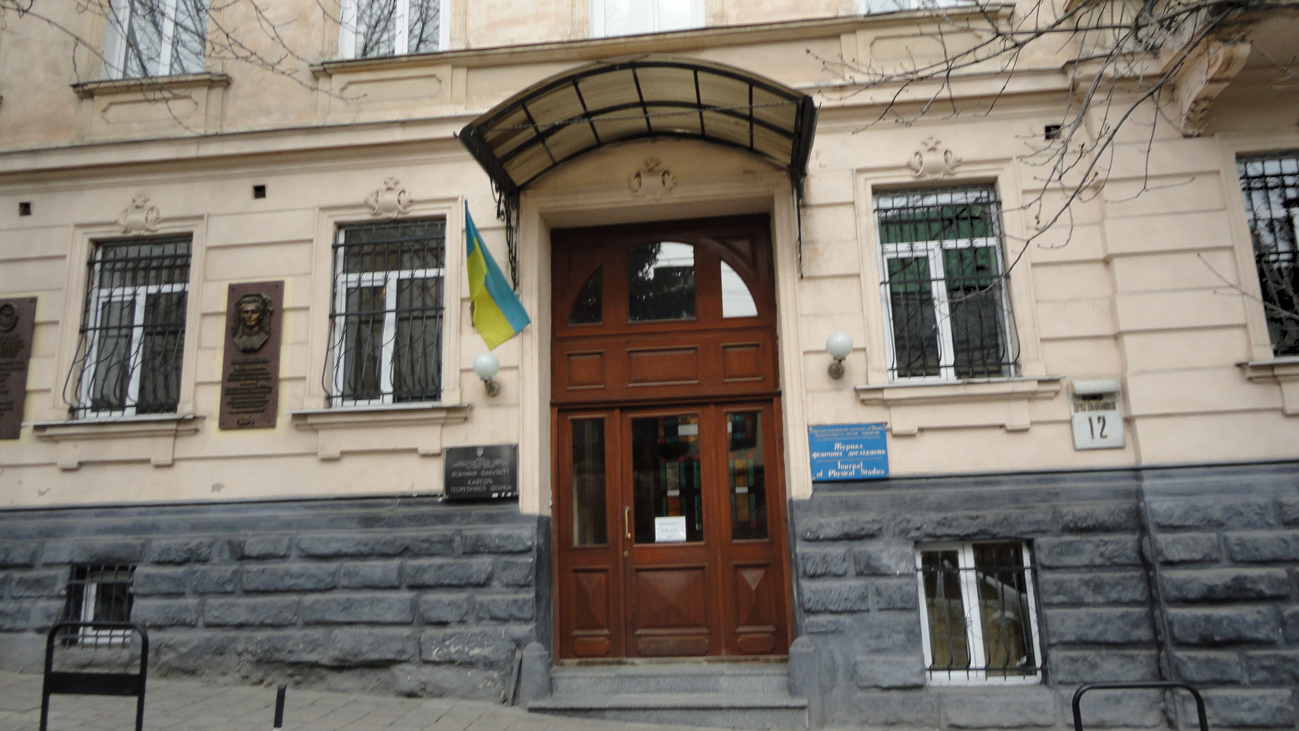 Фотографія будівлі фізичного факультету на вулиці Драгоманова 12. У цій будівлі міститься кафедра теоретичної фізики та редакція журналу фізичних досліджень.